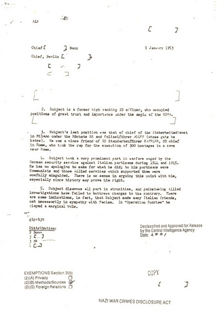 Interner Bericht der CIA über Theo Saevecke vom 8. Januar 1953 Zitat aus Vorblatt des Buches zur Lizensierung: „Except the Preface, Introduction and Conclusion, this is a work of the United States governement and is not protected by copyright in the United States.” -Klammern im Dokument markieren von der CIA vor Veröffentlichung unkenntlich gemachte Stellen. Die dritte Seite des Berichts enthält durch die eingeschränkte Veröffentlichung keine Informationen, verdeutlich allerdings den Umfang der von der CIA unkenntlich gemachten Stellen.